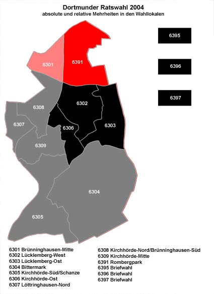 Absolute und relative Mehrheiten in den Wahllokalen des Wahlbezirks 31 bei den Komunalwahlen 2004